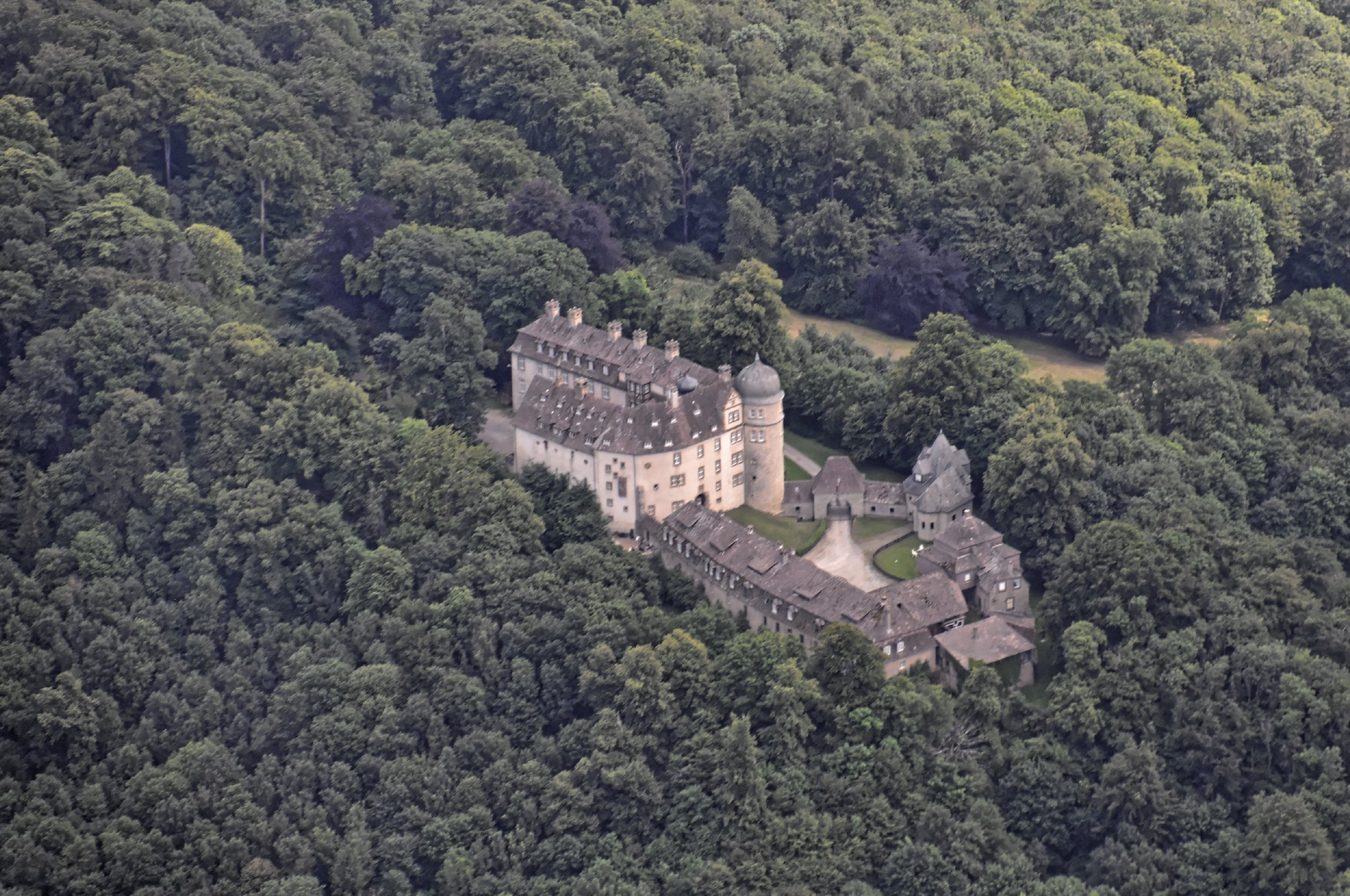 Bilder vom Flug Nordholz-Hammelburg 2015: Schloss Hinnenburg